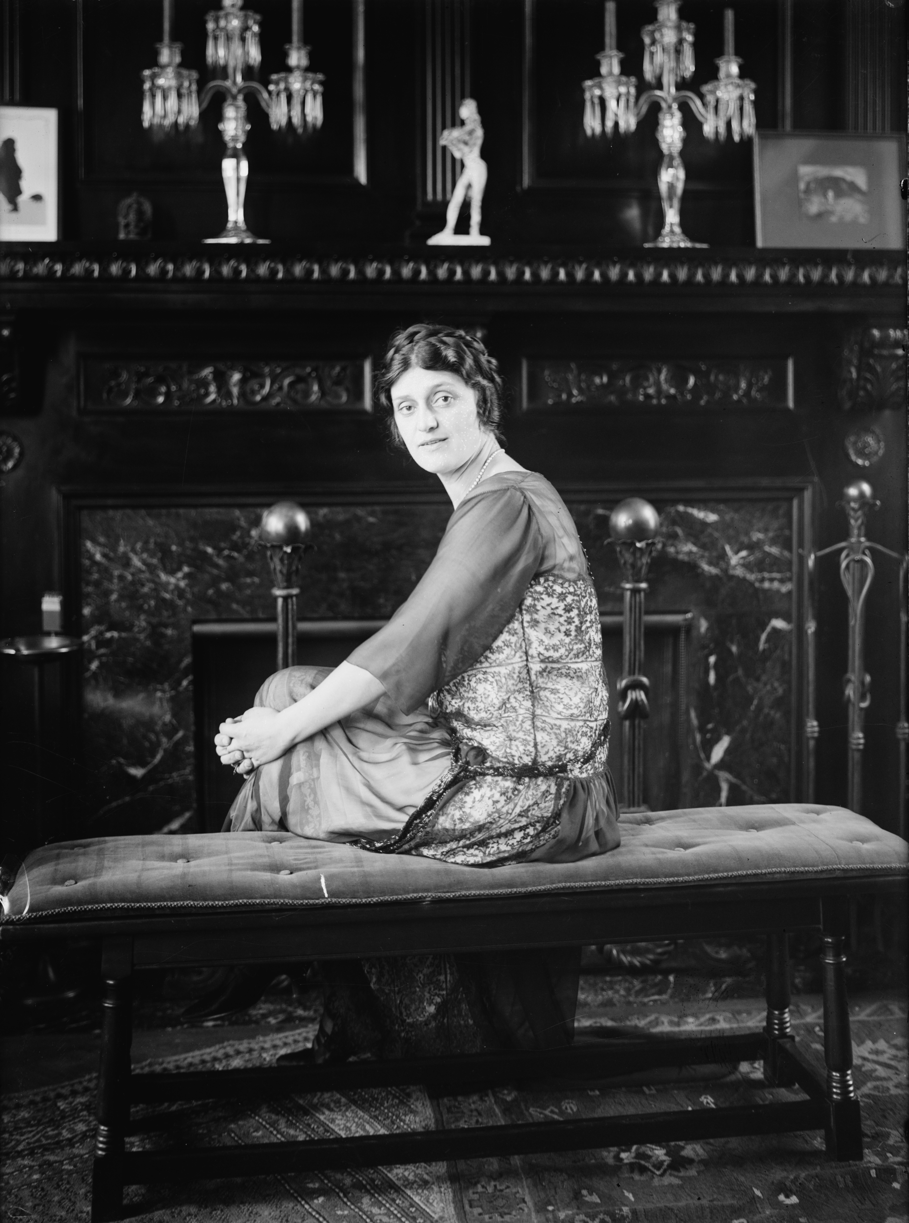 Alma Gluck (1884 - 1938), American soprano